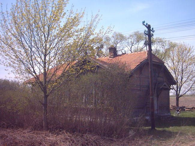 Zwodzieckie . Nieczynna stacja kolejowa.